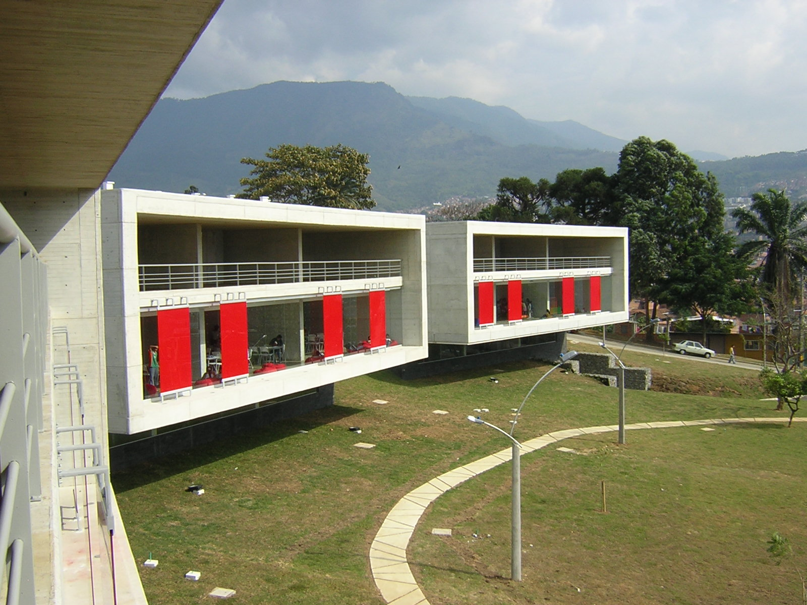 Biblioteca León de Greiff, Medellín, Colombia